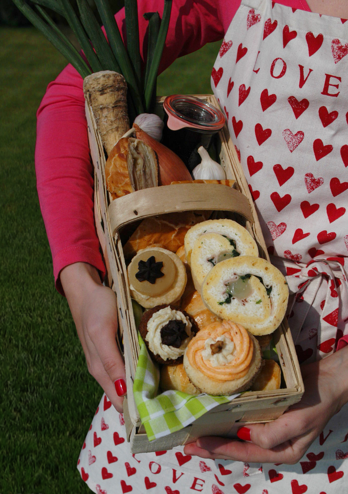 Tvarůžkové moučníky v košíku